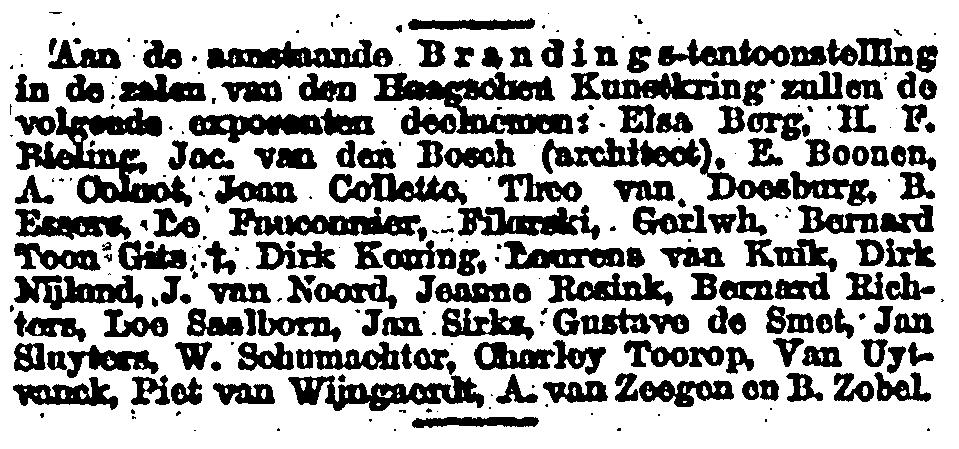 Anoniem, '(...) Branding-tentoonstelling (...)', Nieuwe Rotterdamsche Courant, 75e jaargang, nr. 253 (12 september 1918): Avondblad A. 1.